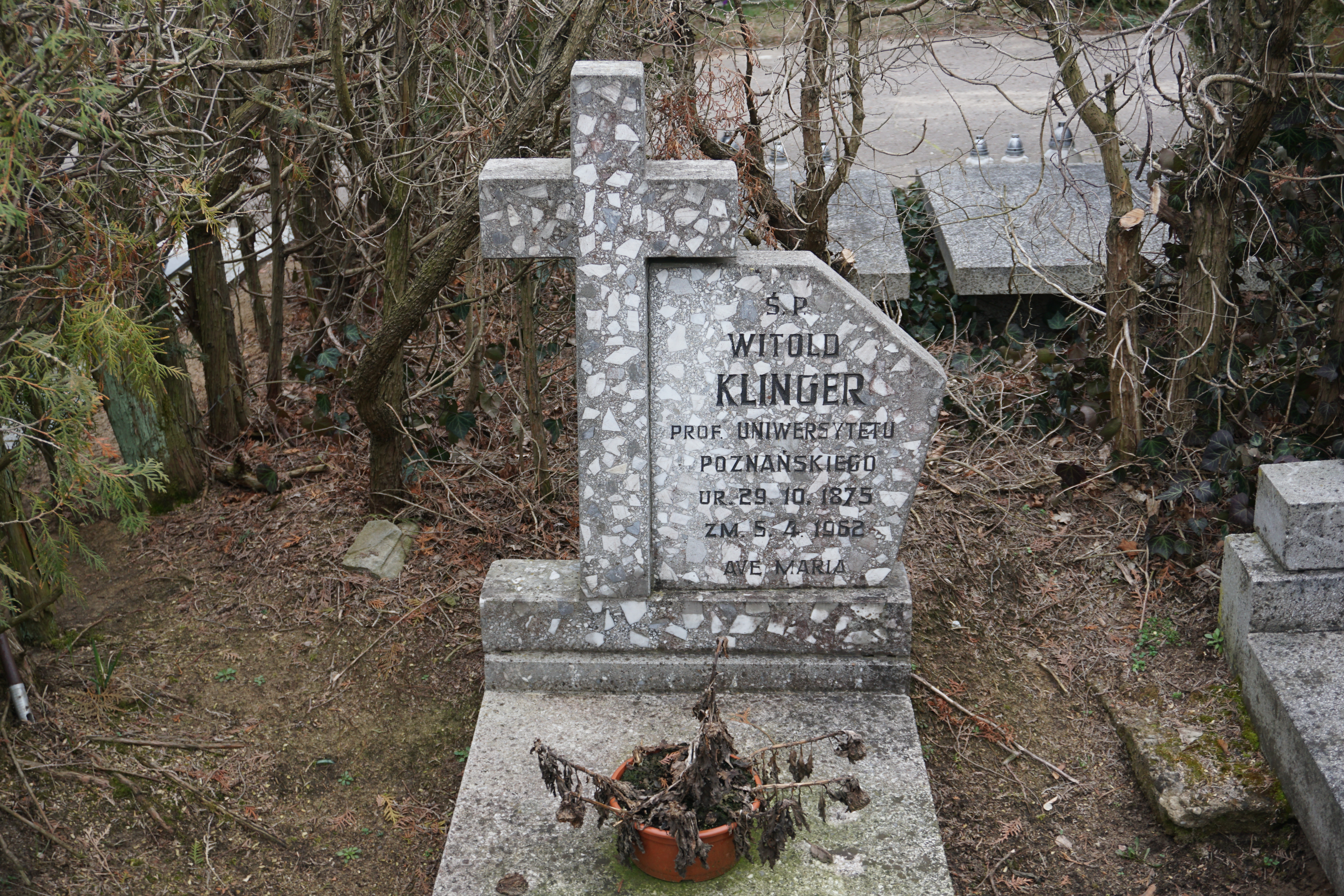 Grób prof. Witolda Klingera na Cmentarzu Junikowskim